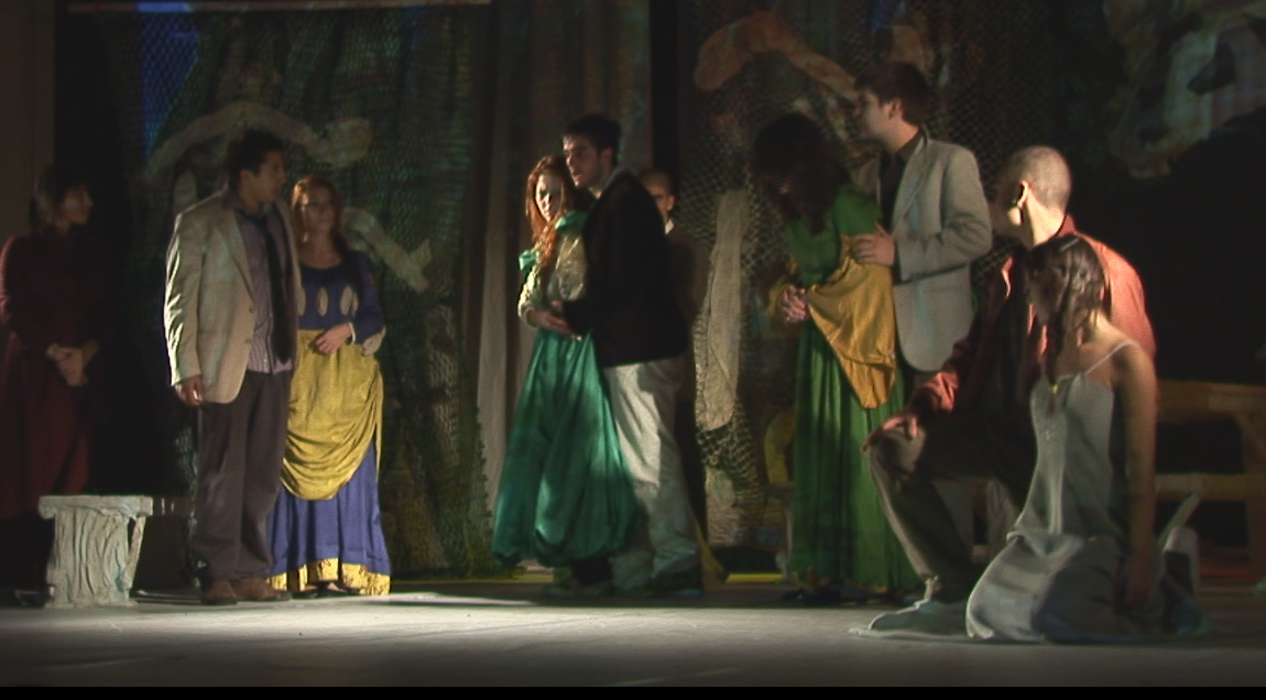 Дефисто в "Женско царство"